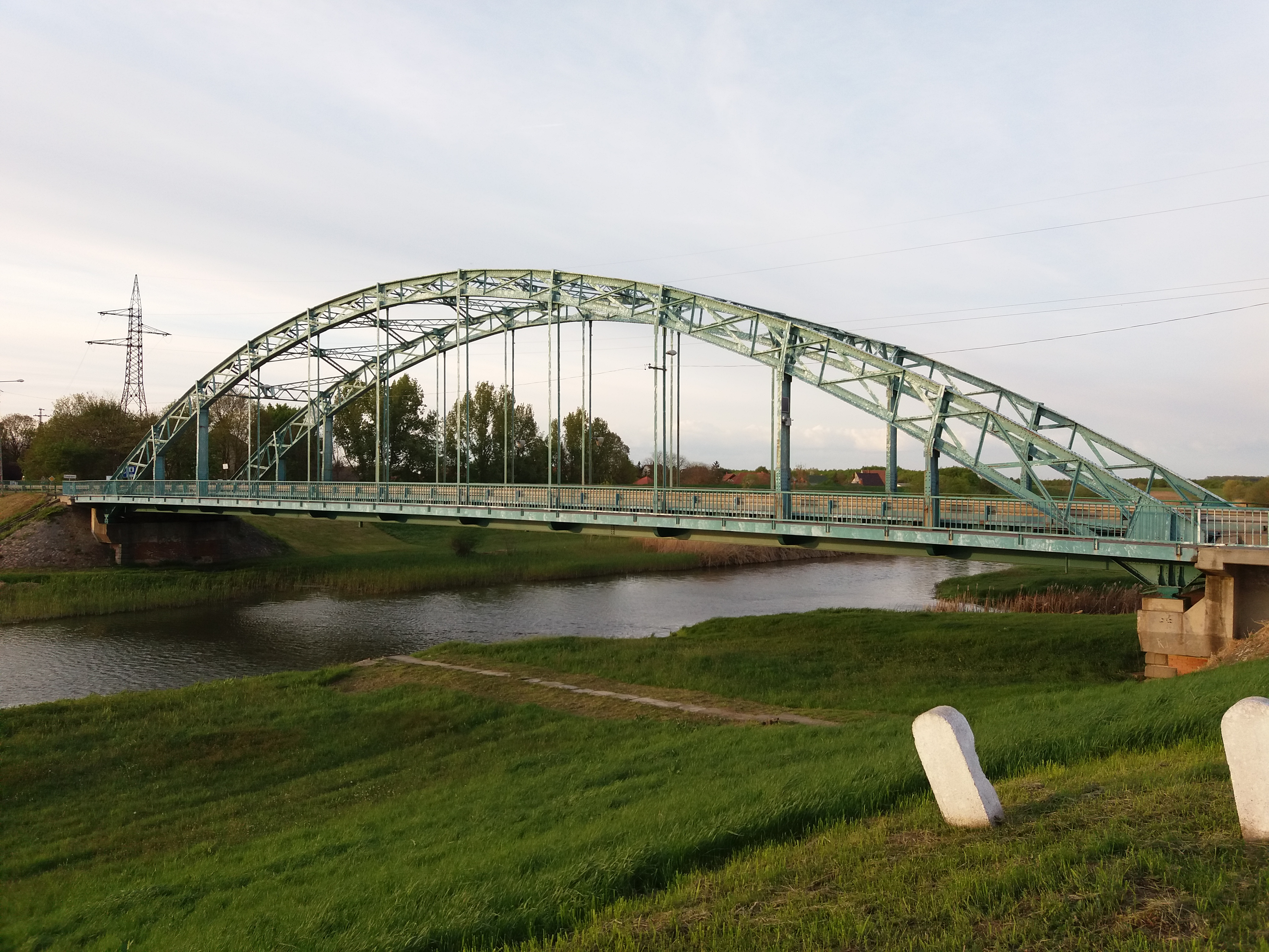 Berettyó-híd, Szeghalom, Békés megye